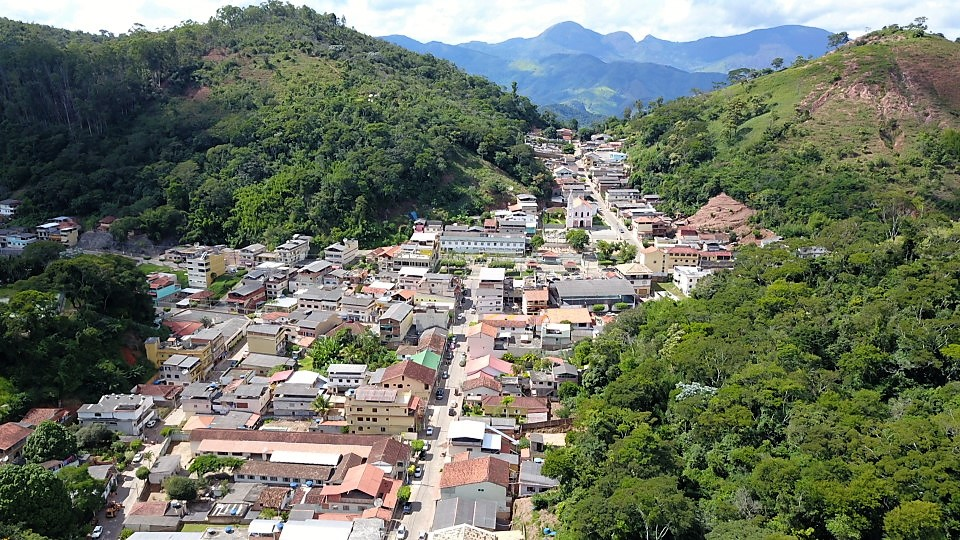 Foto da cidade de São Sebastião do Alto RJ